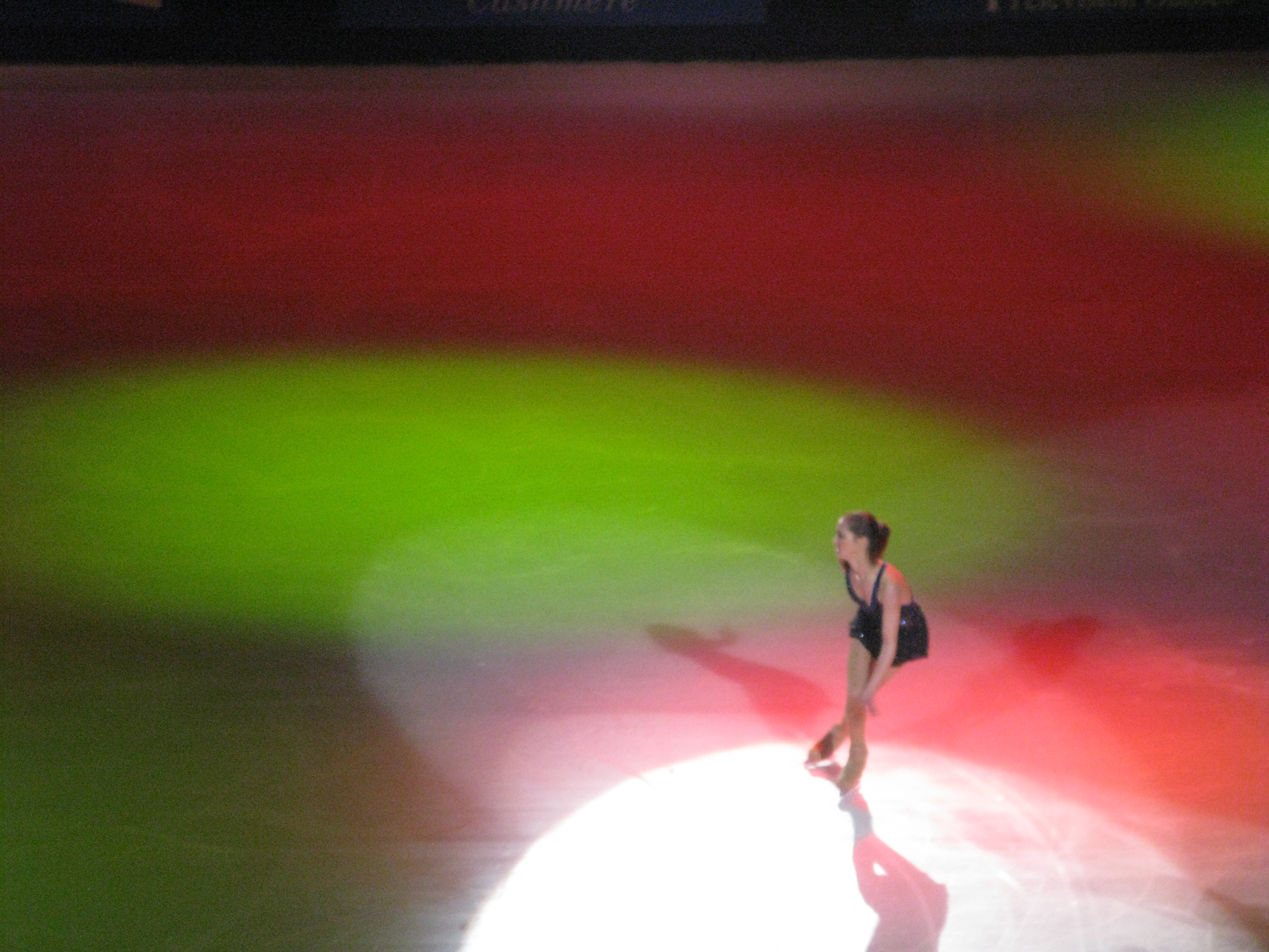 Candice Didier, Gala des champions, Trophée Eric Bompard 2010, Paris